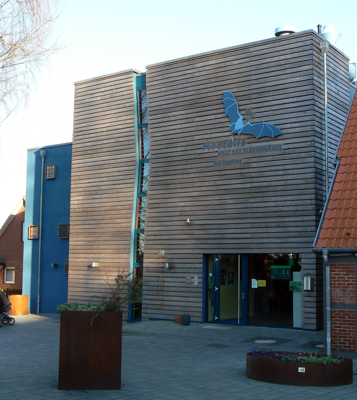 Eingang vom Fledermauszentrum Noctalis - Welt der Fledermäuse in Bad Segeberg.